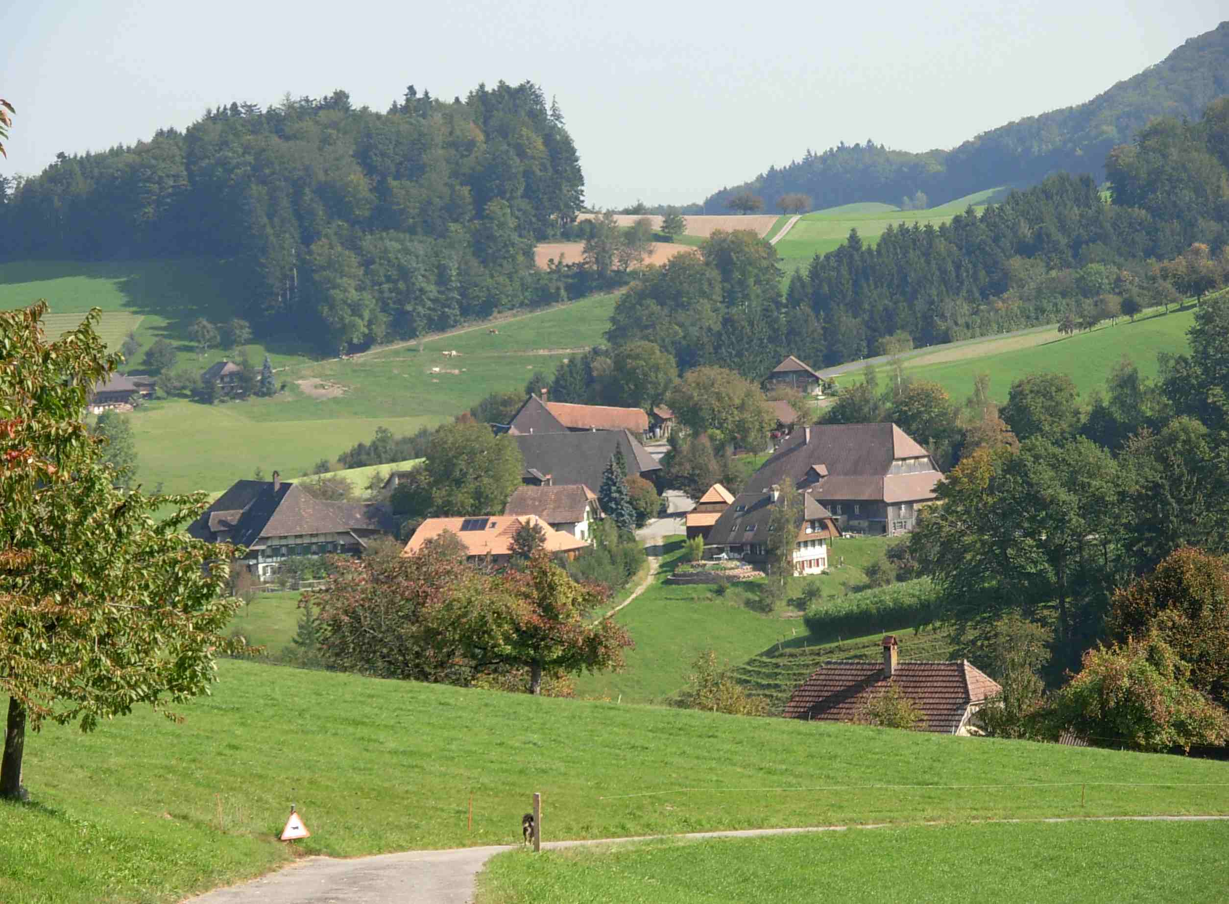 Blick nach Ochlenberg (Dorf) von Stauffenfeld